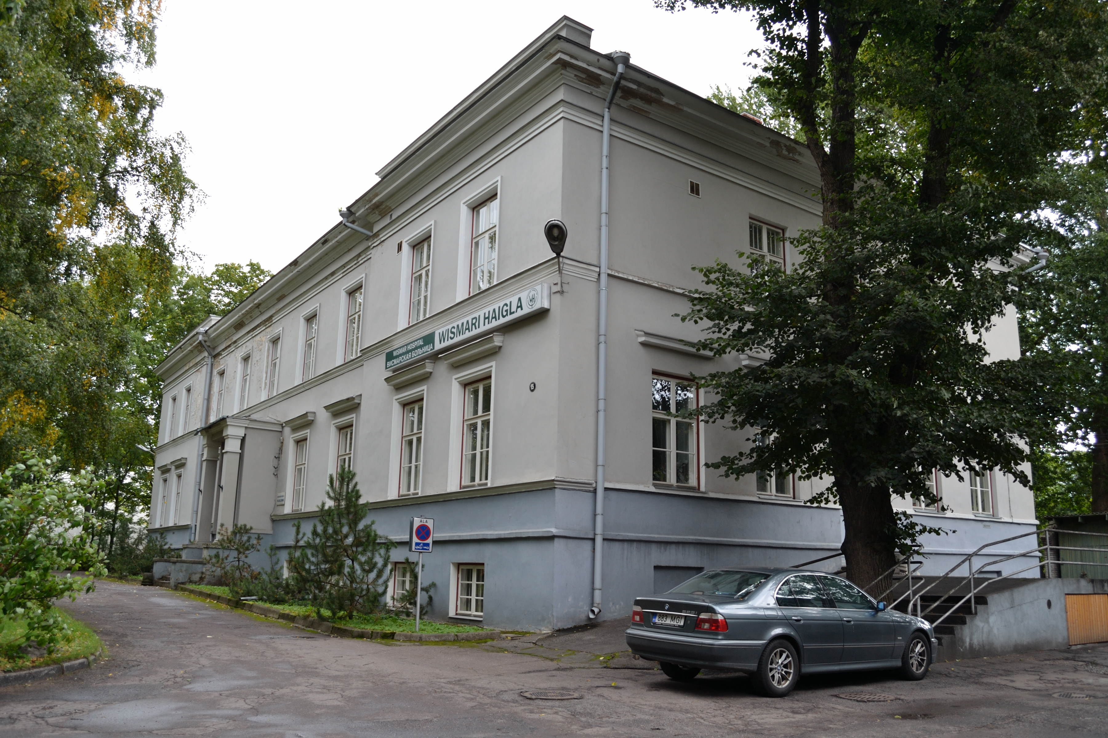 Tallinn, maja, kus aastatel 1867-1917 asus Toomvaestekool, Wismari 15